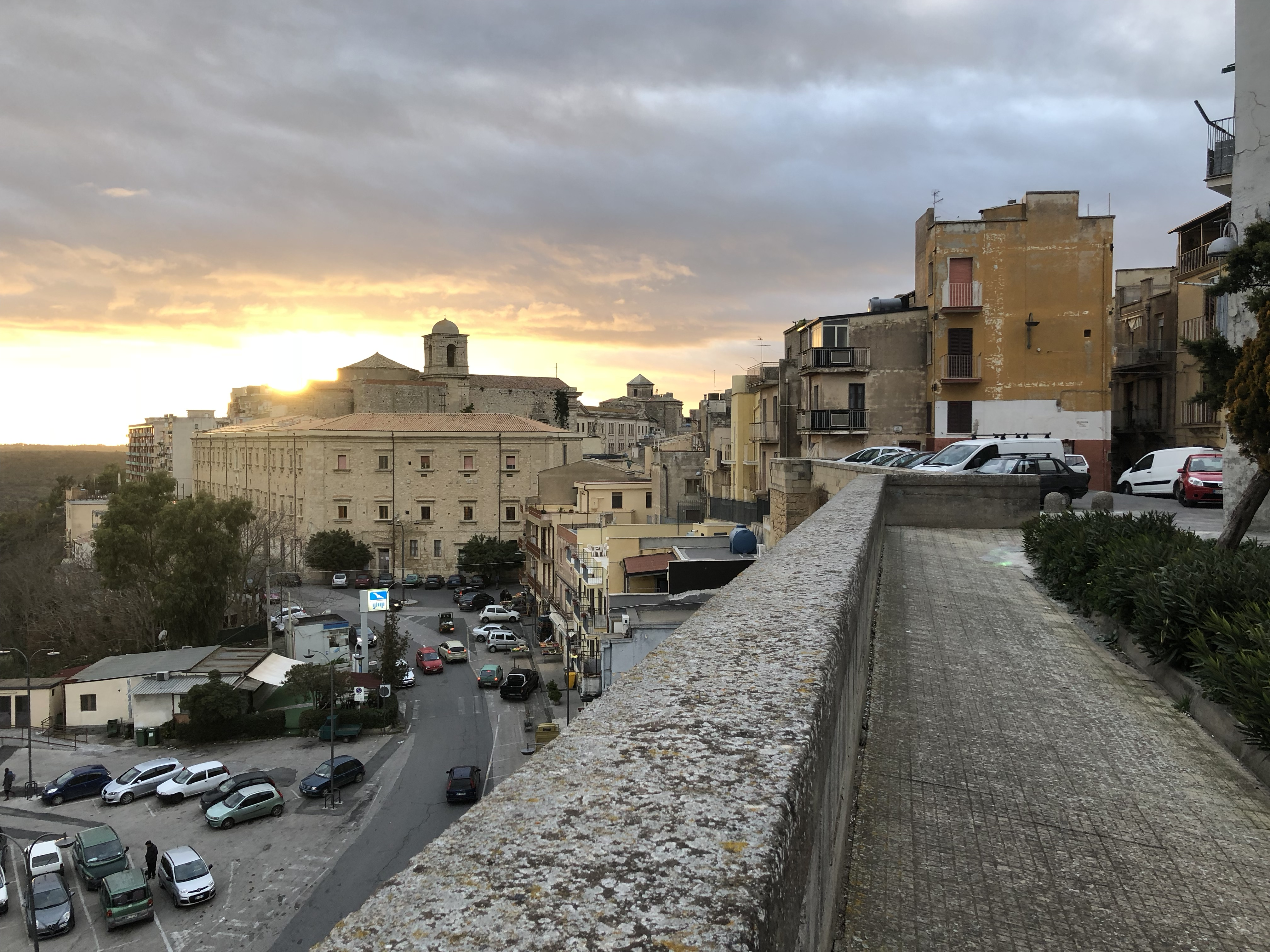 Scorcio di Mineo